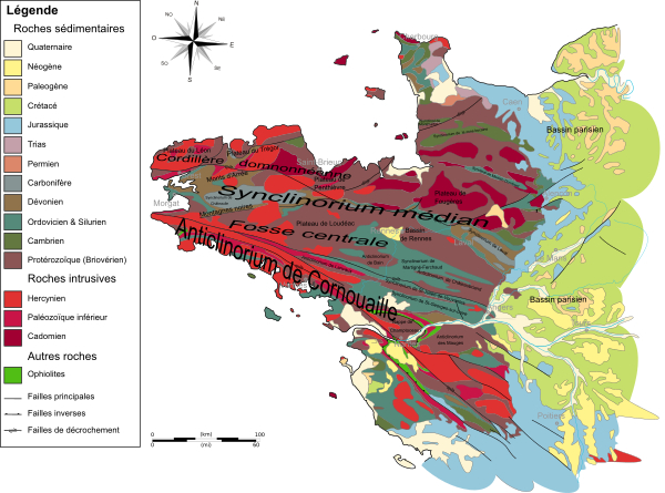 Carte géomorphologique de Morgat